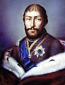 Jorge XII